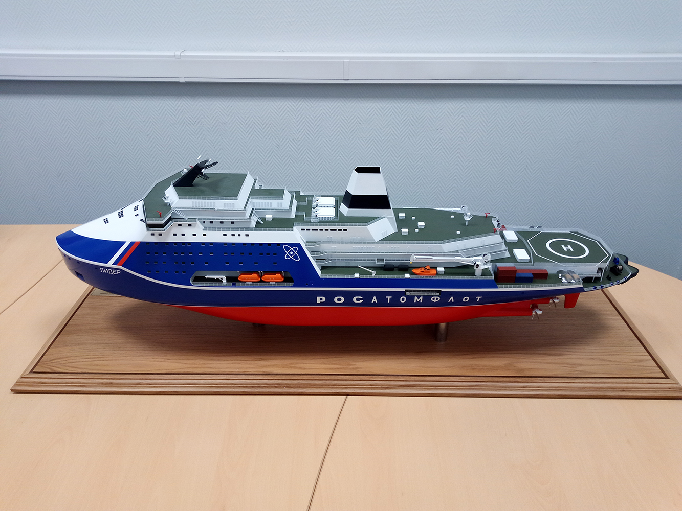 Макет ледокола "Лидер"